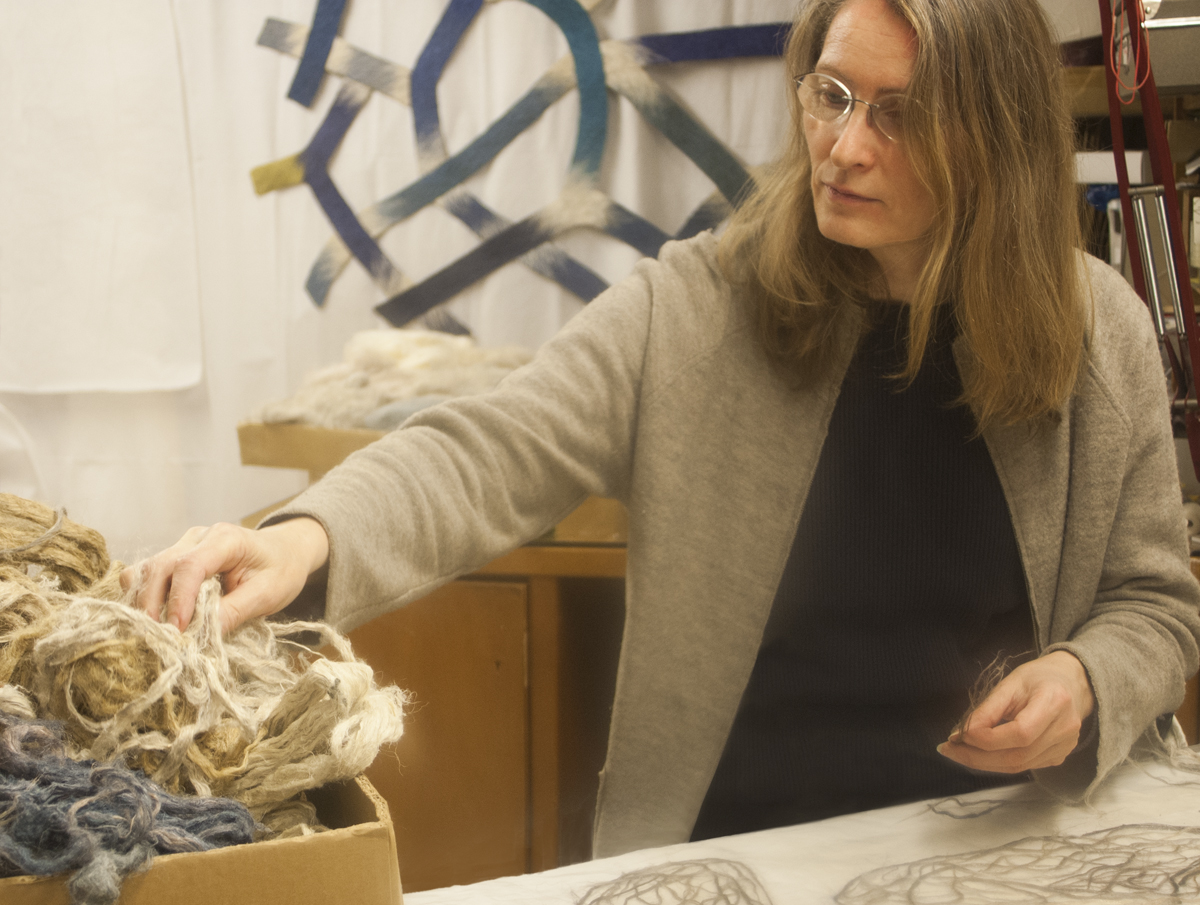 Textile artist Raija Jokinen (Finland) in her Helsinki workroom in 2014